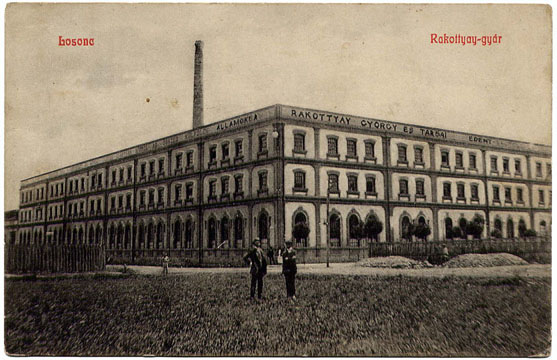 Pohľadnica - Lučenská smaltovňa Rakottyay Györgya zo začiatku 20. storočia